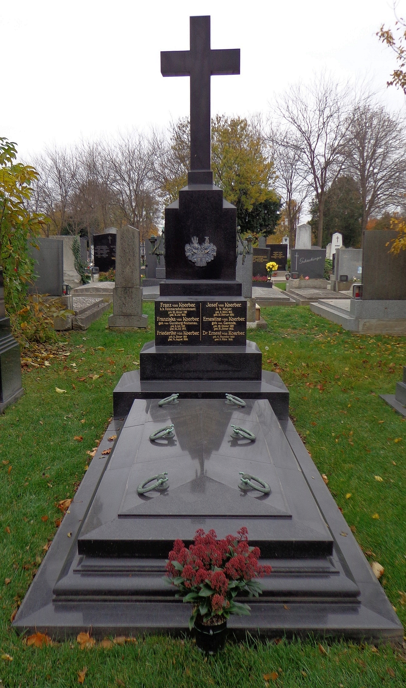 Wiener Zentralfriedhof - Grab von Ernest von Koerber